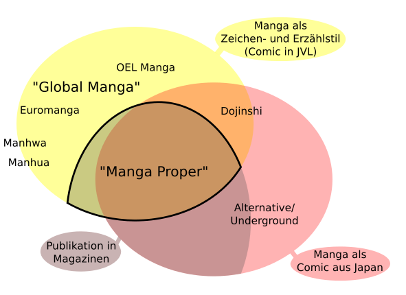 eigenes Werk, basiert auf Erläuterungen in Zoltan Kacsuk: Re-examining the “what is manga” problematic und Jaqueline Berndt: Manga, Which Manga? – Publication Formats, Genres, Users. In: Andrew Targowski, Juri Abe, Hisanori Kato (Hrsg.): Japanese civilization in the 21st century. Nova Science Publishers, 2016, S. 121–131.